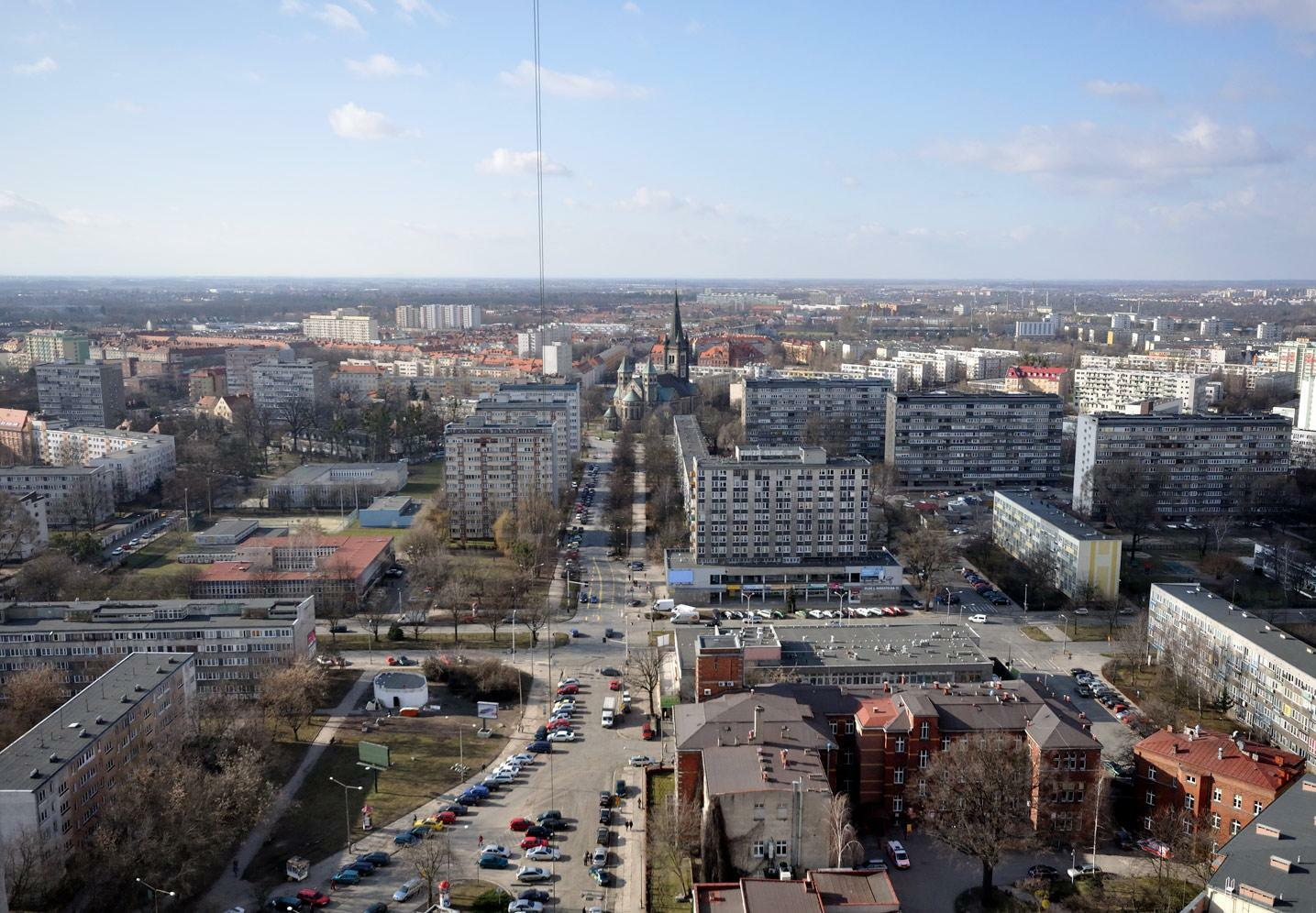 Widok na ulicę Kruczą z 20 piętra Sky Tower...